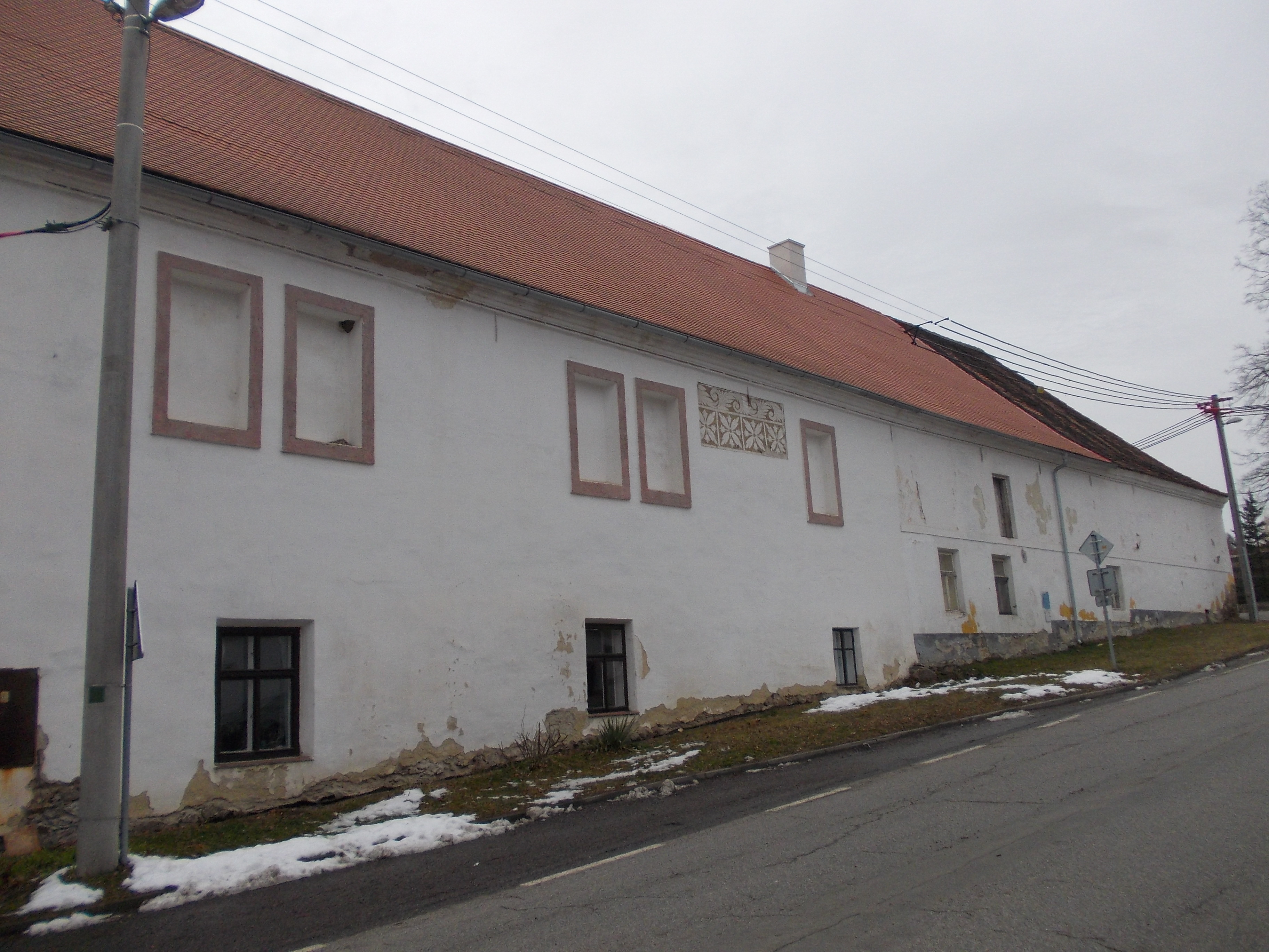 Čepřovice